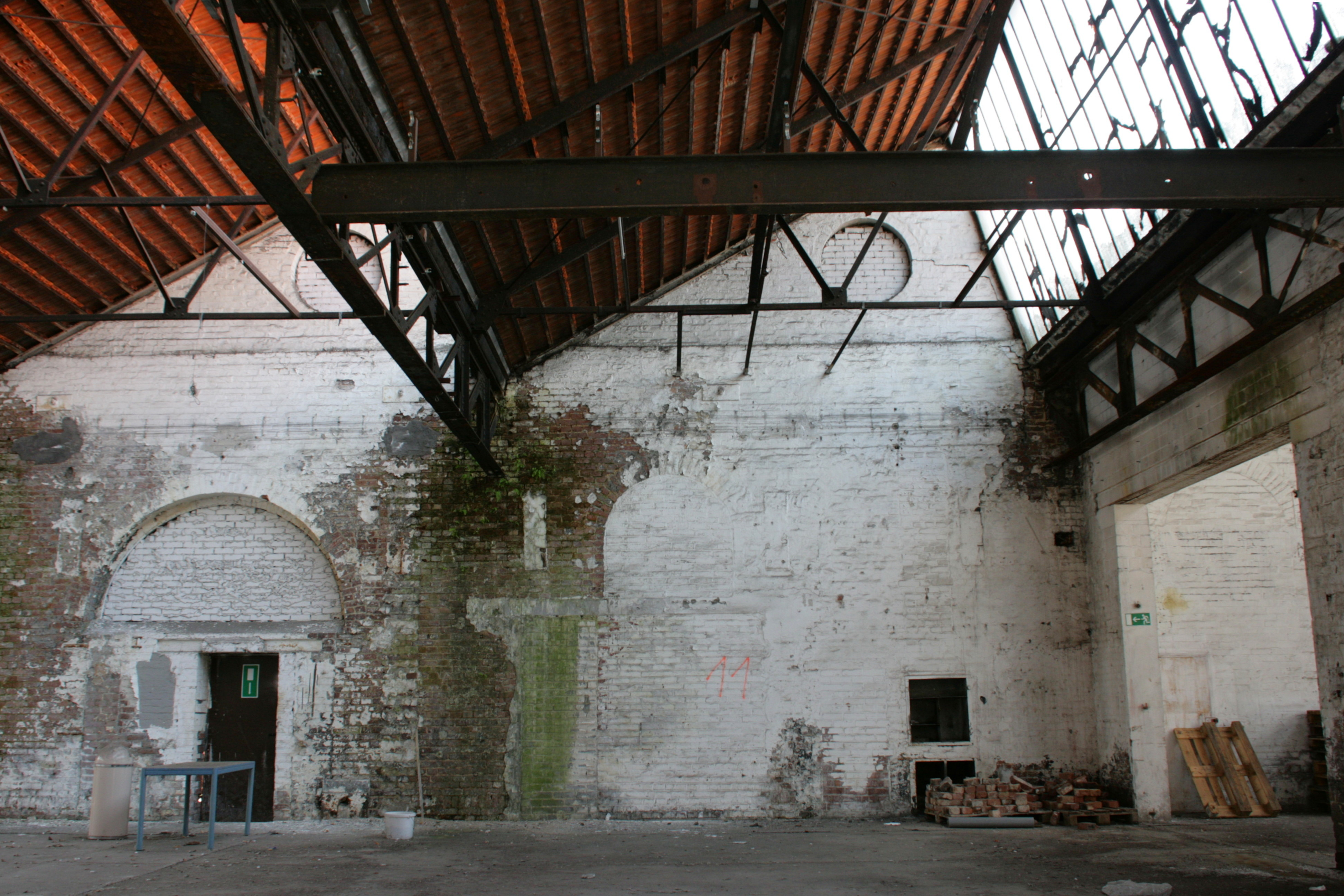 Zeche Ewald in Herten